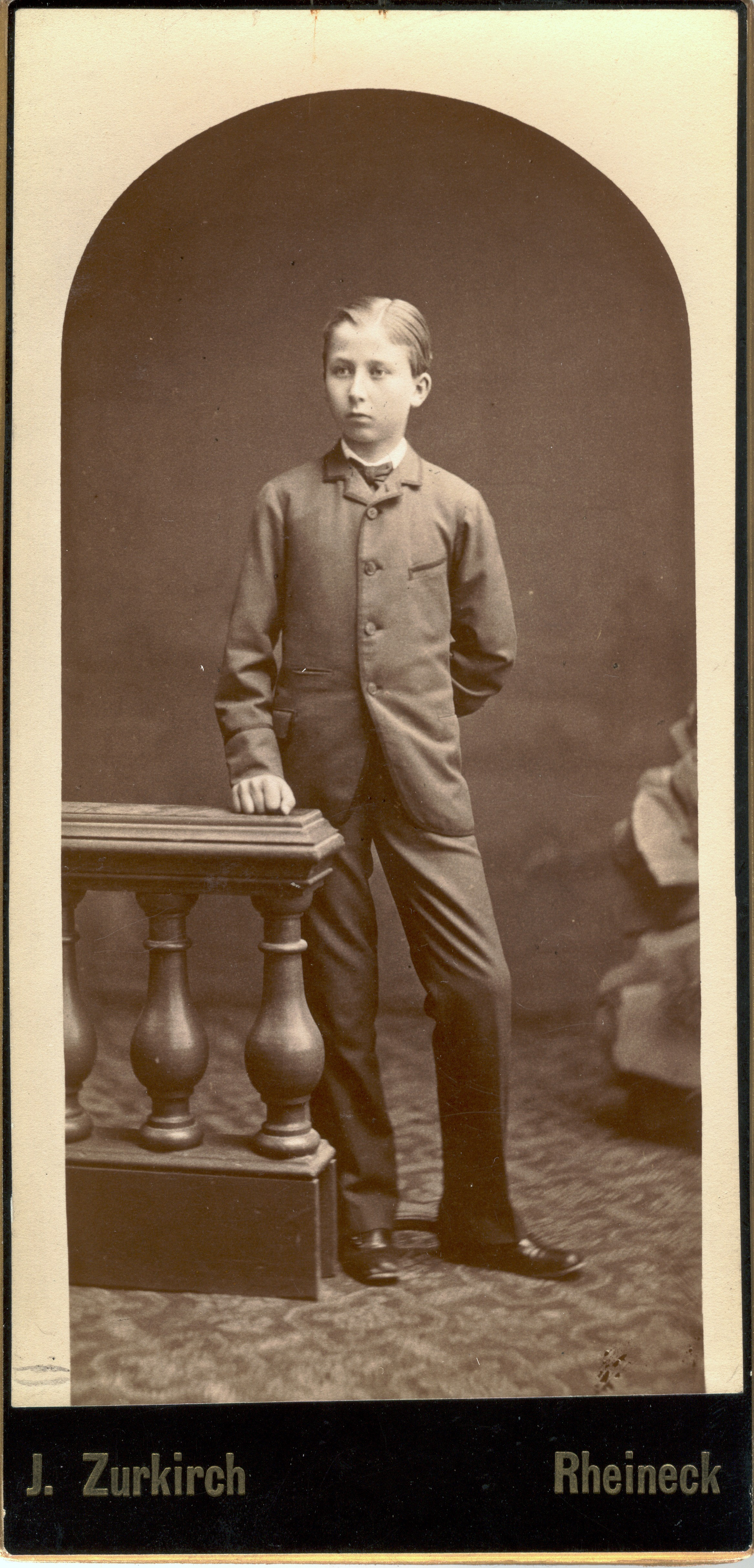 Le prince Baudouin photographié à Rheineck par Zurkirch en septembre 1881.